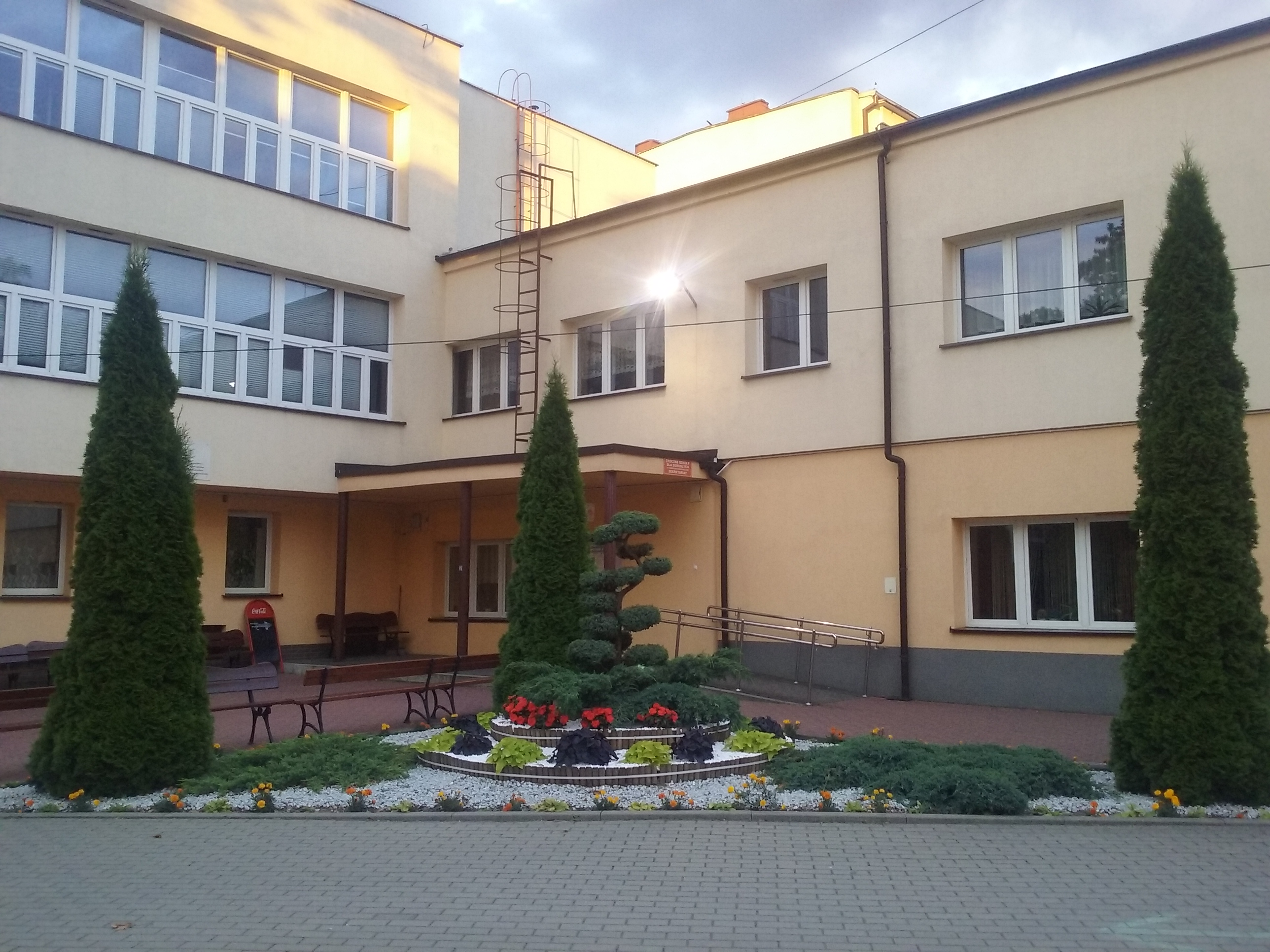 Szkoła kadetów (ZSP1) w Tomaszowie Mazowieckim